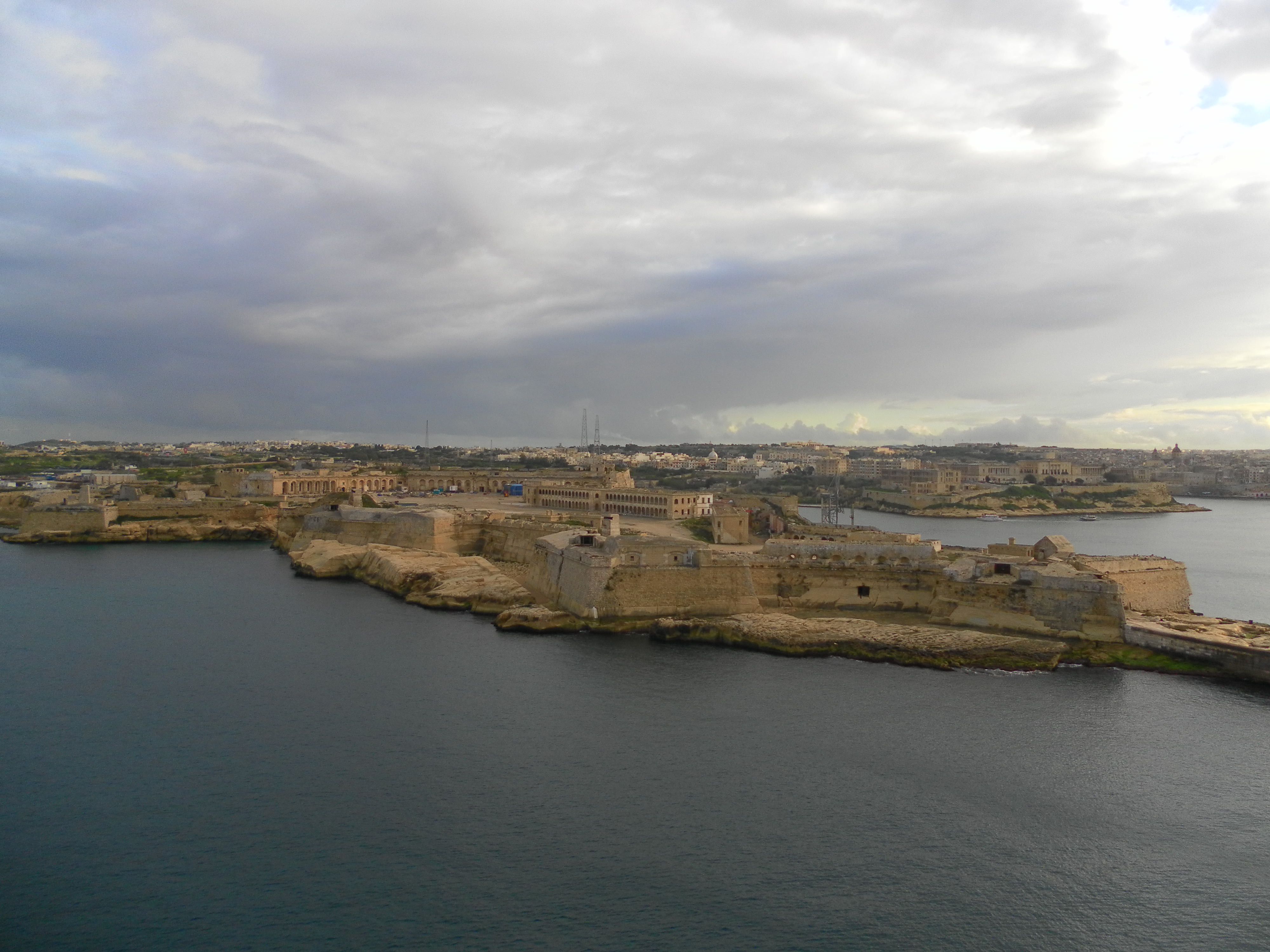 Fort Ricasoli in Kalkara, Malta